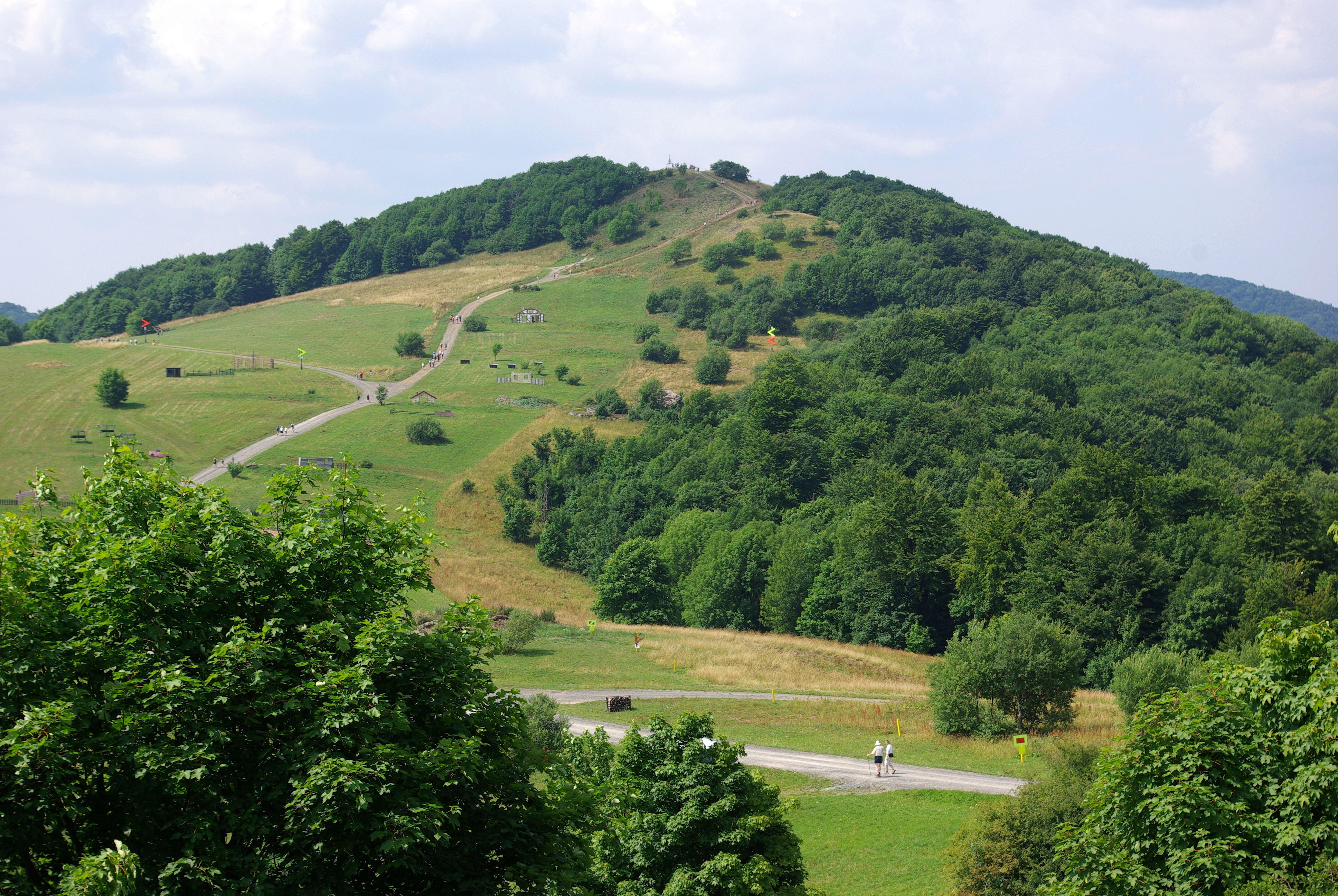 Der Eierhauck im Truppenübungsplatz Wildflecken in der Rhön